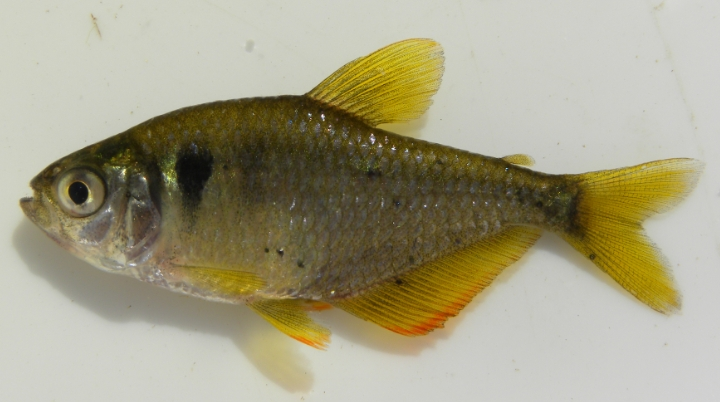 ejemplar macho de Rocha, Uruguay